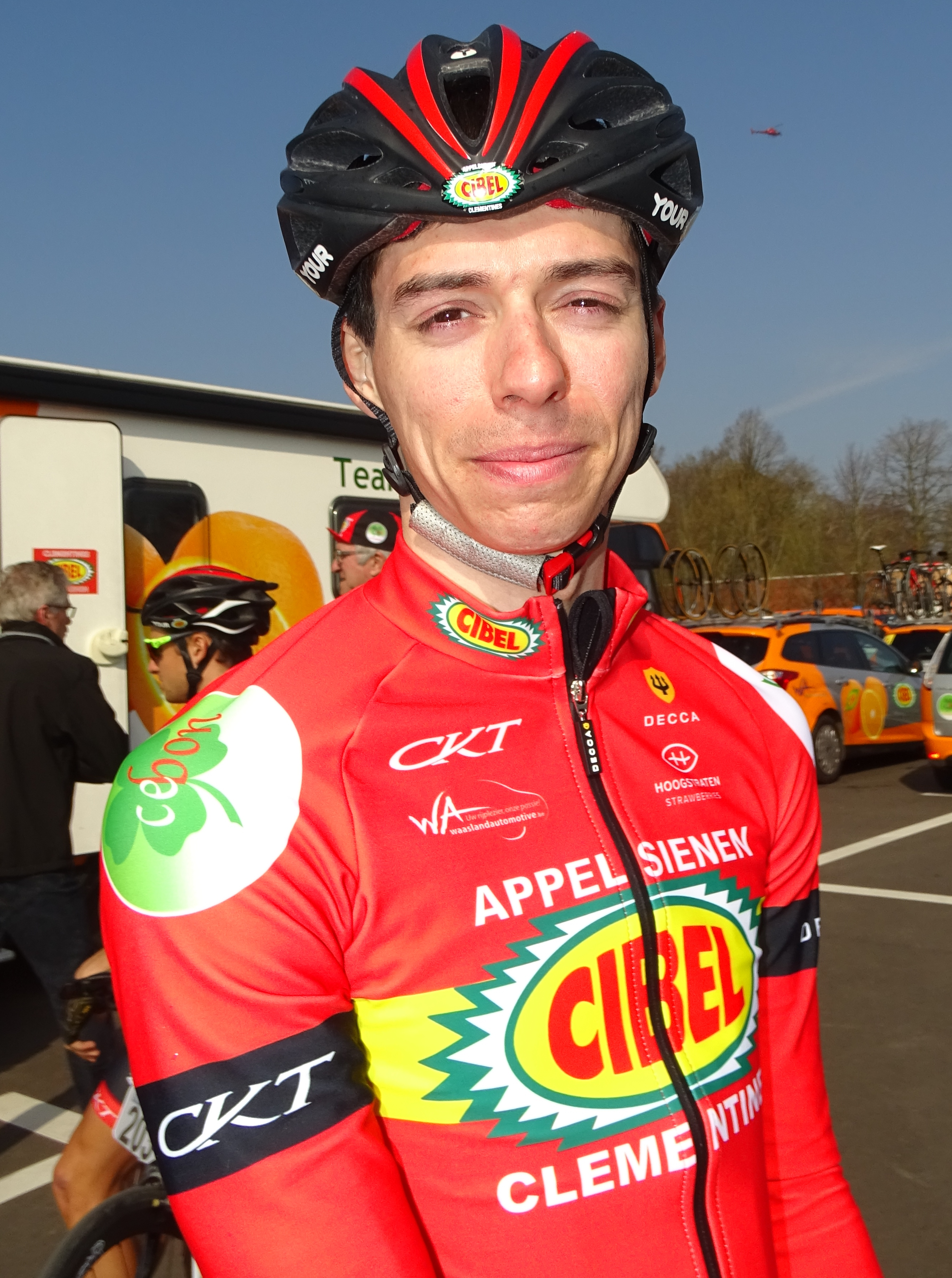 Reportage réalisé le mardi 28 mars à l'occasion de du départ de la première étape des Trois jours de La Panne 2017 à Adinkerque (La Panne), Belgique.